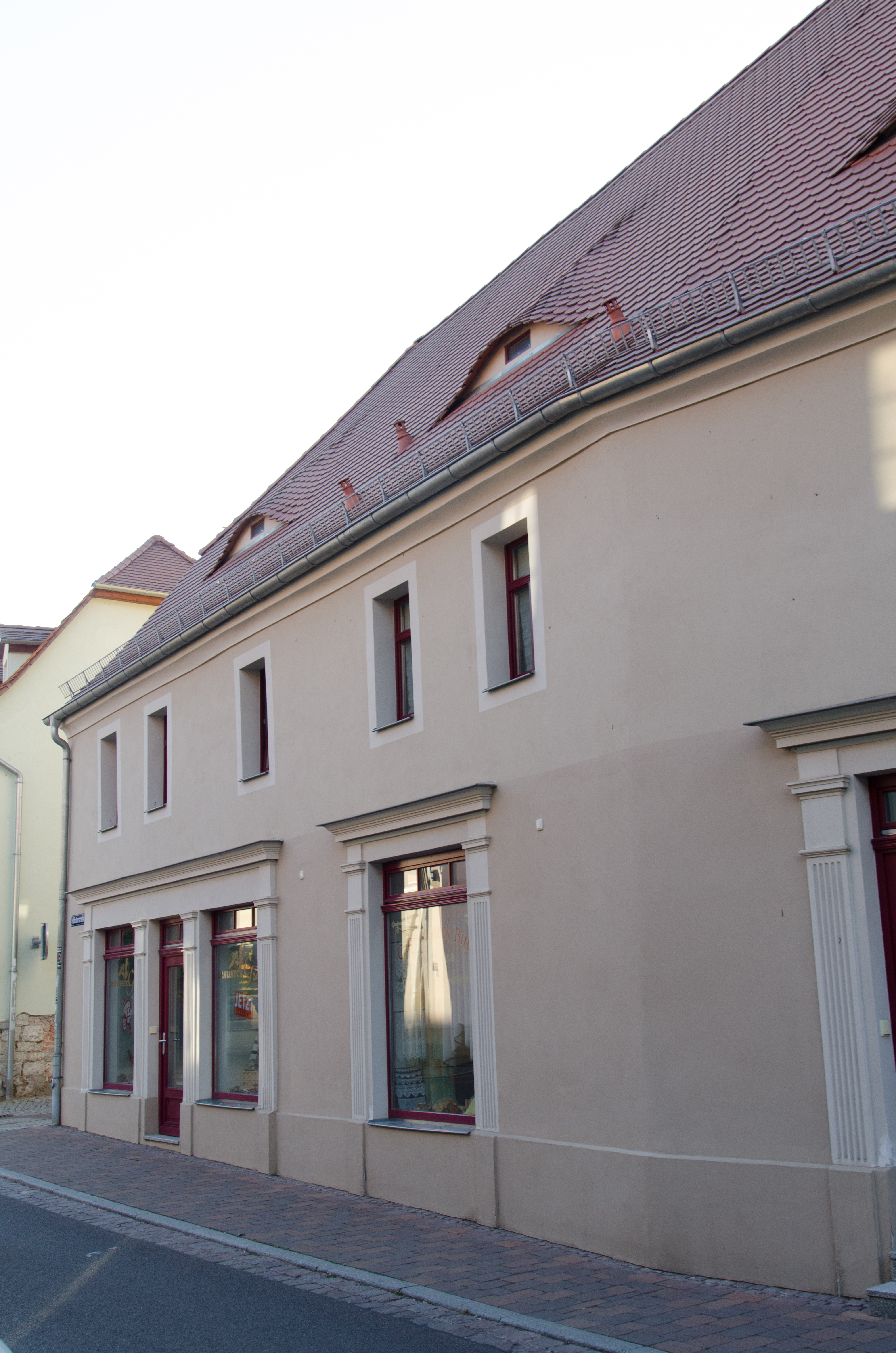 Querfurt, Klosterstraße 1